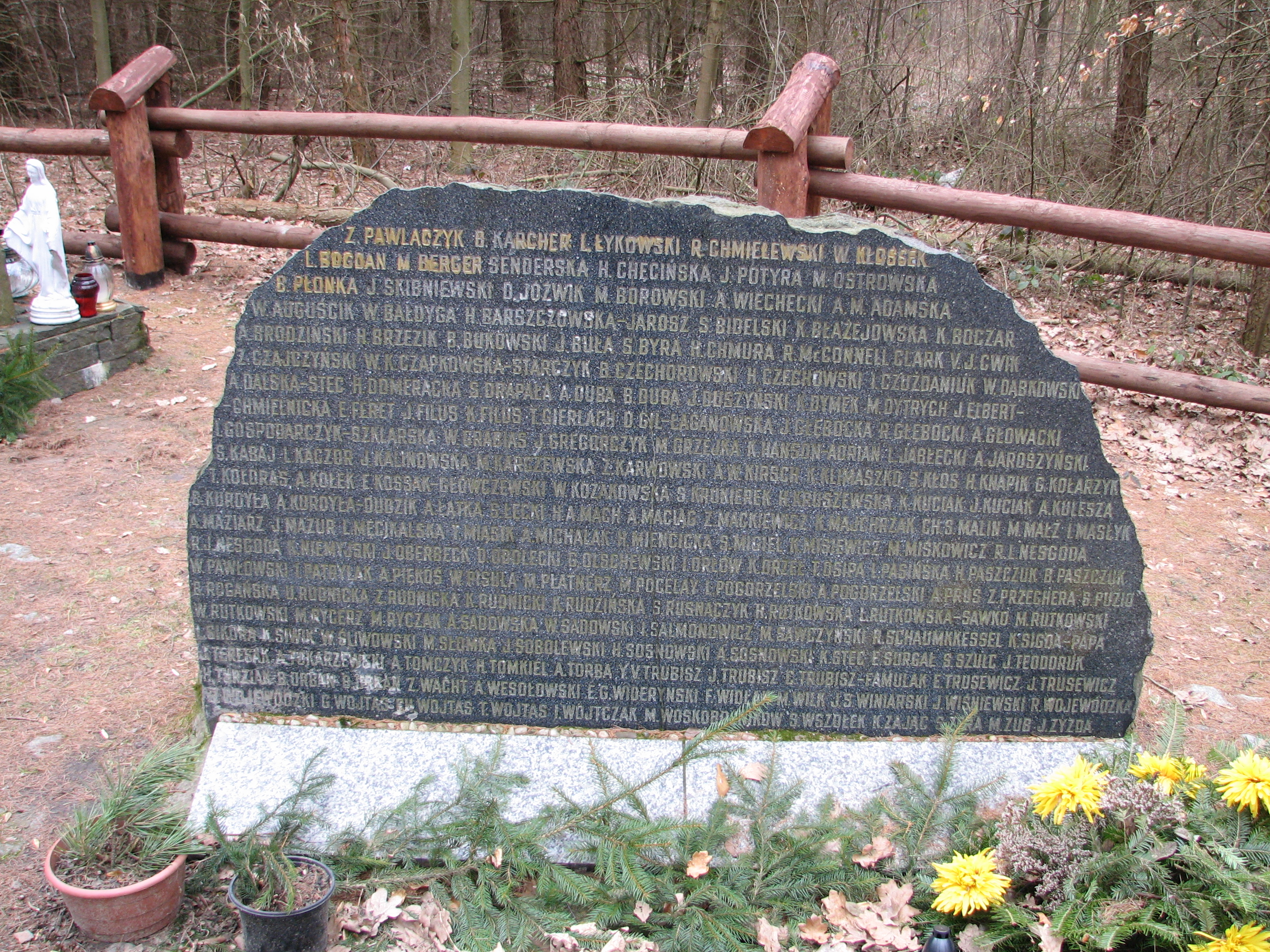 Miejsce katastrofy samolotu Ił-62M SP-LBG "Tadeusz Kościuszko" zaistniałej 9 maja 1987 roku. Warszawa, Las Kabacki al. Załogi Samolotu Kościuszko